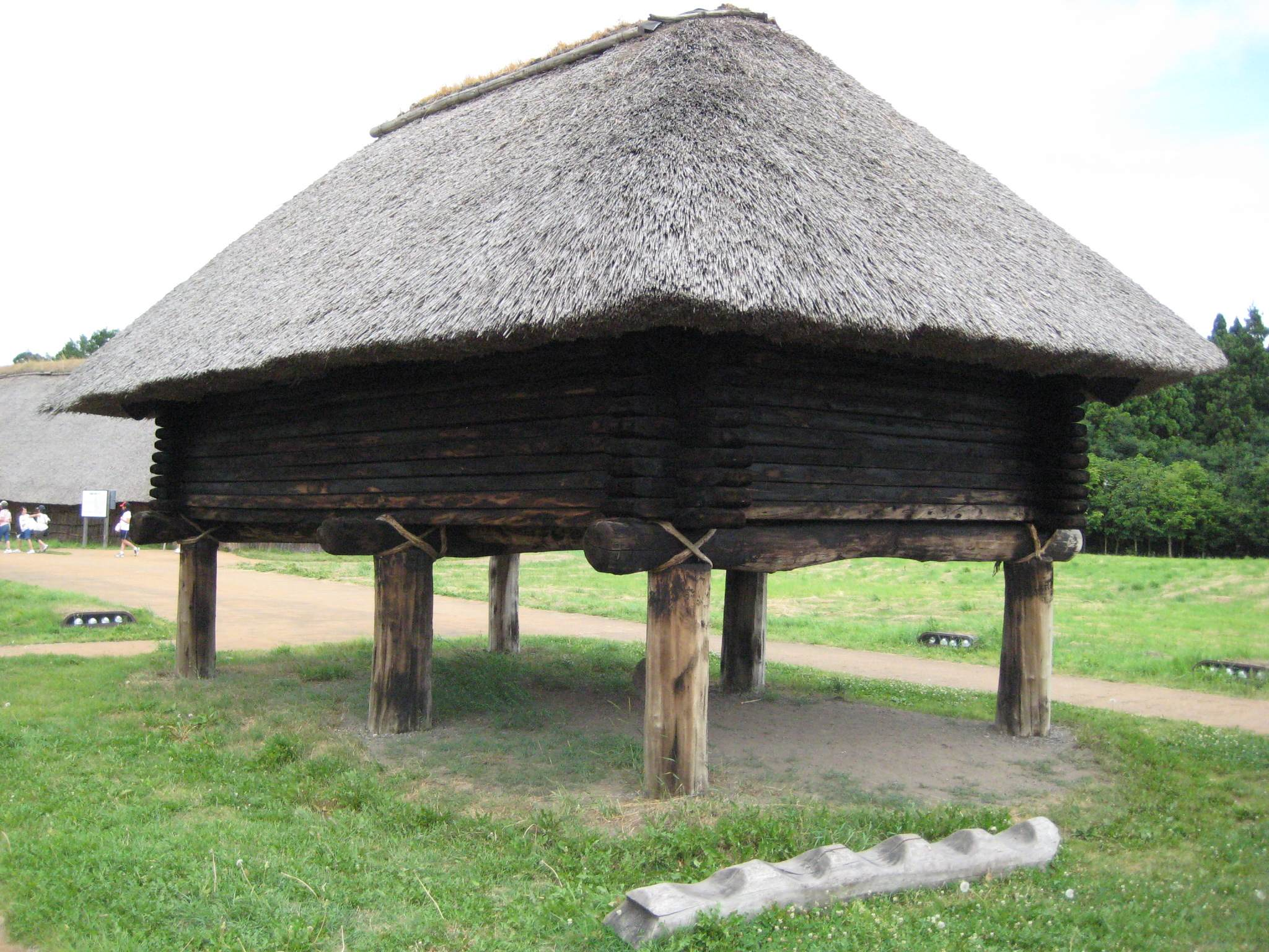 Habitation sur piloti au Site de Sannai Maruyama